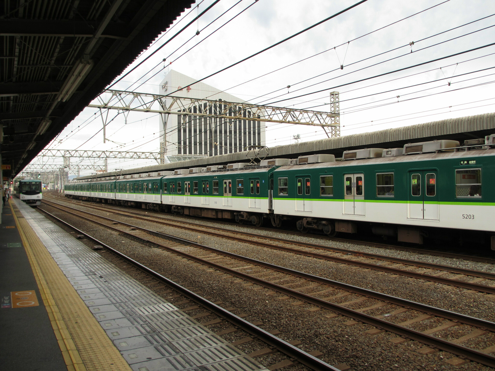 Keihan Furukawabashi Station platform